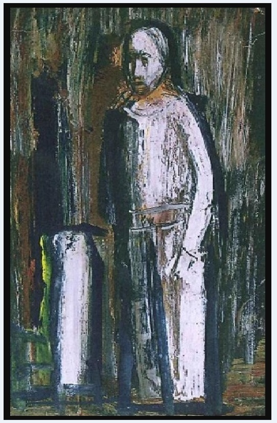 Mario Sironi - Zusammensetzung (ende der 40er Jahre)